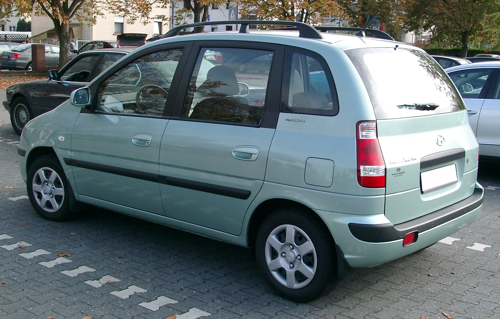 Hyundai Matrix